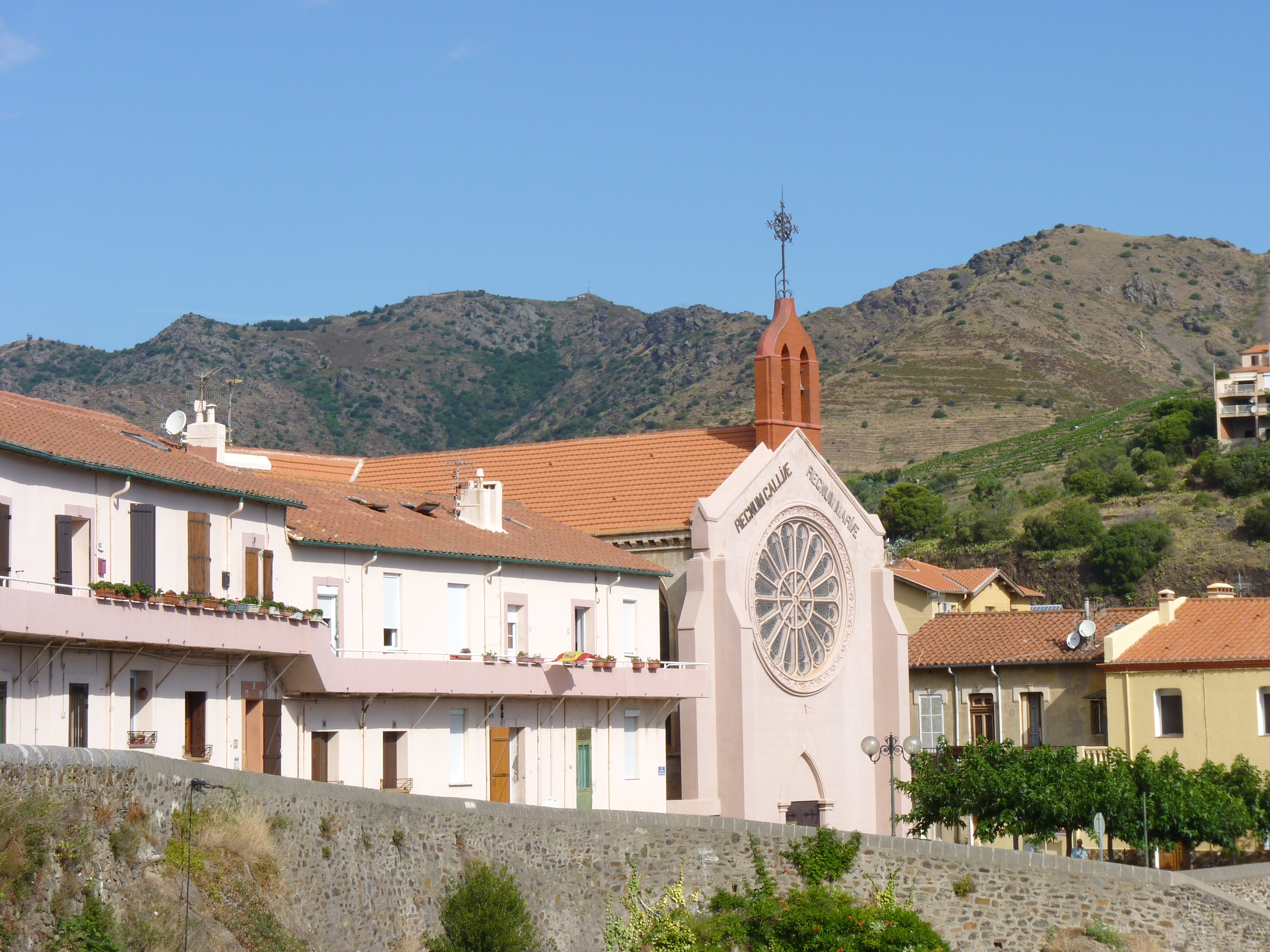 Église paroissiale Saint-Sauveur, Cerbère (Pyrénées-Orientales, Languedoc-Roussillon, France)